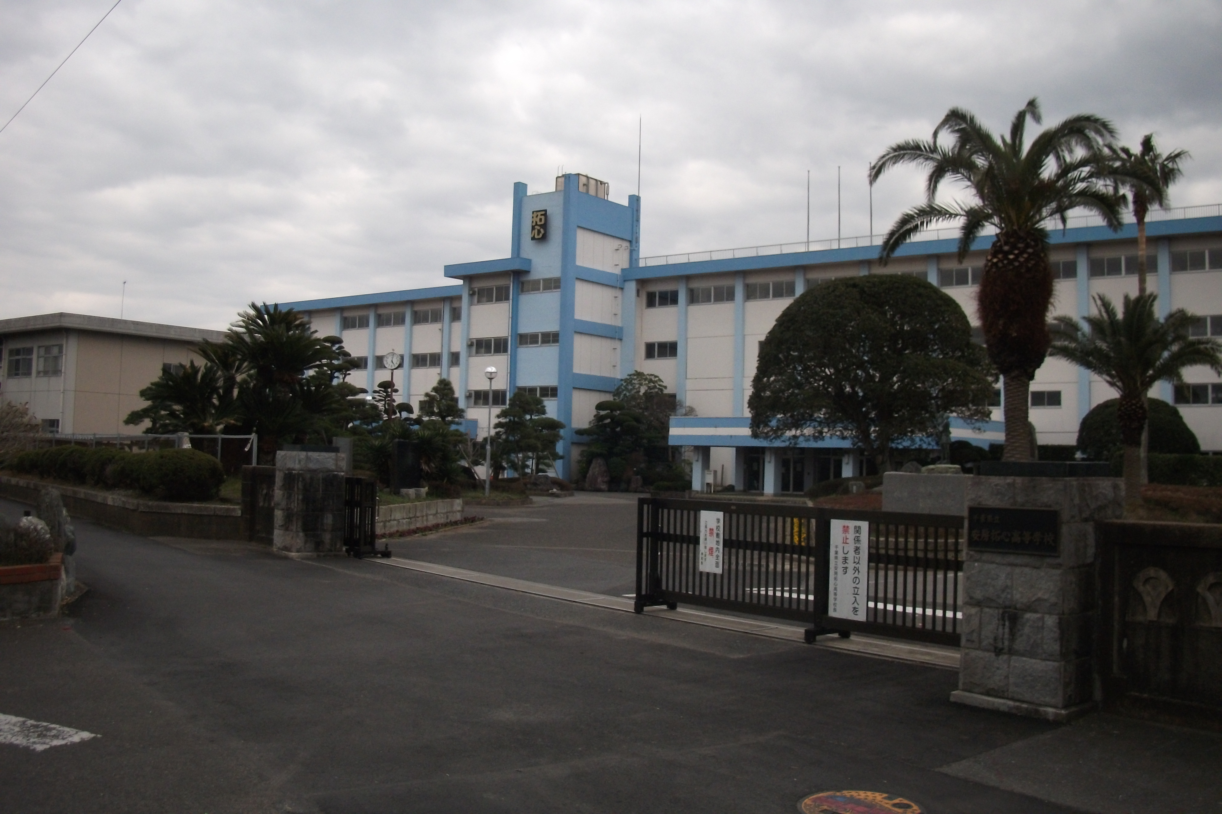 千葉県立安房拓心高等学校